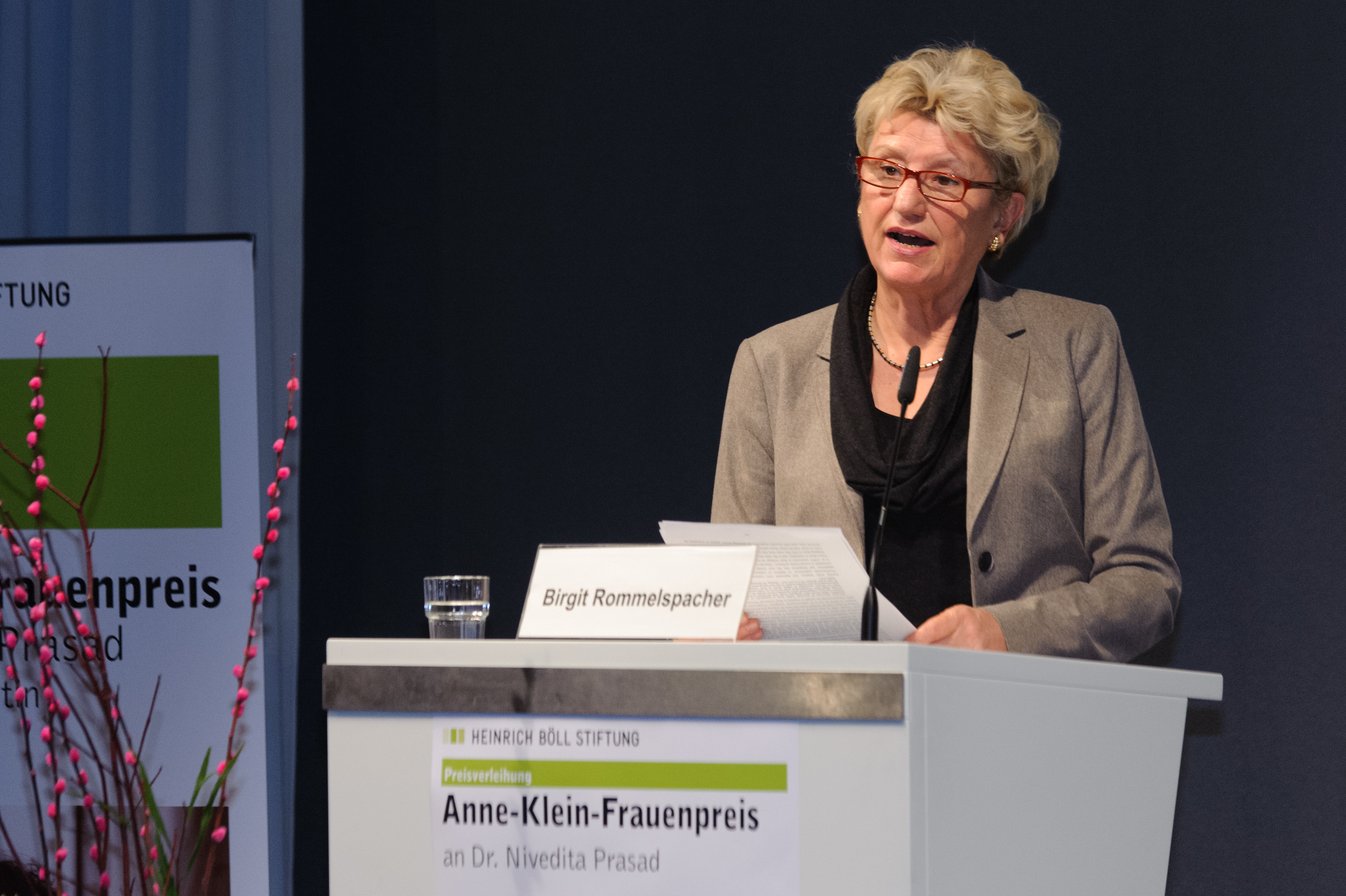 Laudatio: Prof. Dr. Birgit Rommelspacher, Professorin für Psychologie mit dem Schwerpunkt Interkulturalität und Geschlechterstudien Anne-Klein-Frauenpreis 2012 Mit fast 400 Gästen war die Verleihung des ersten Anne-Klein-Frauenpreises an die Menschenrechtsaktivistin Dr. Nivedita Prasad ein voller Erfolg. Die Geehrte nutzte die Veranstaltung nicht nur, um langjährigen Weggefährtinnen und Unterstützerinnen zu danken, sondern machte auch auf bestehende Missstände aufmerksam.